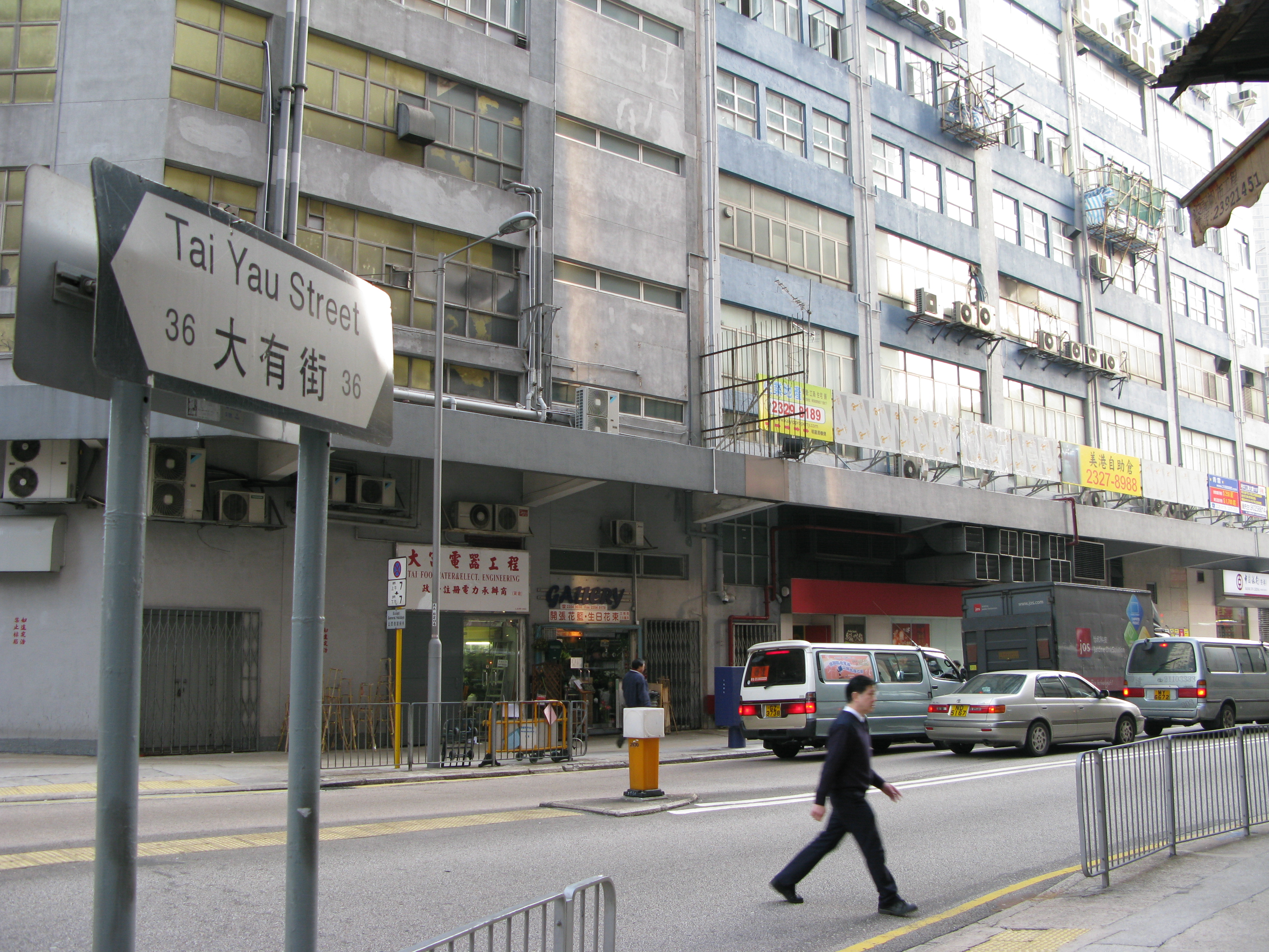 中文（香港）: 香港新蒲崗大有街